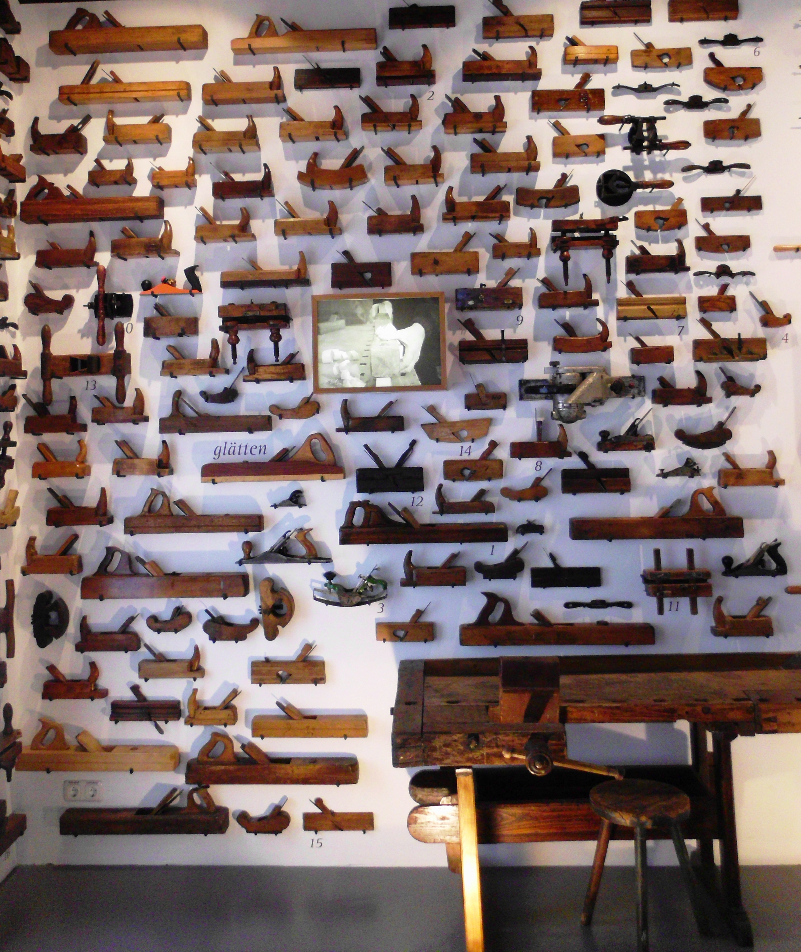 Bootsbauhandwerk, Hobelsammlung